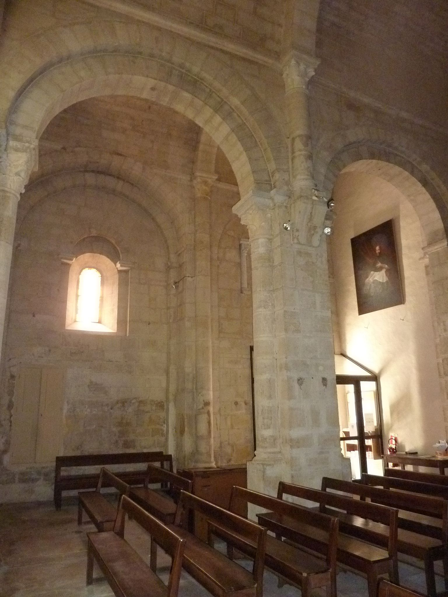 Église simultanée de Beaumont-lès-Valence